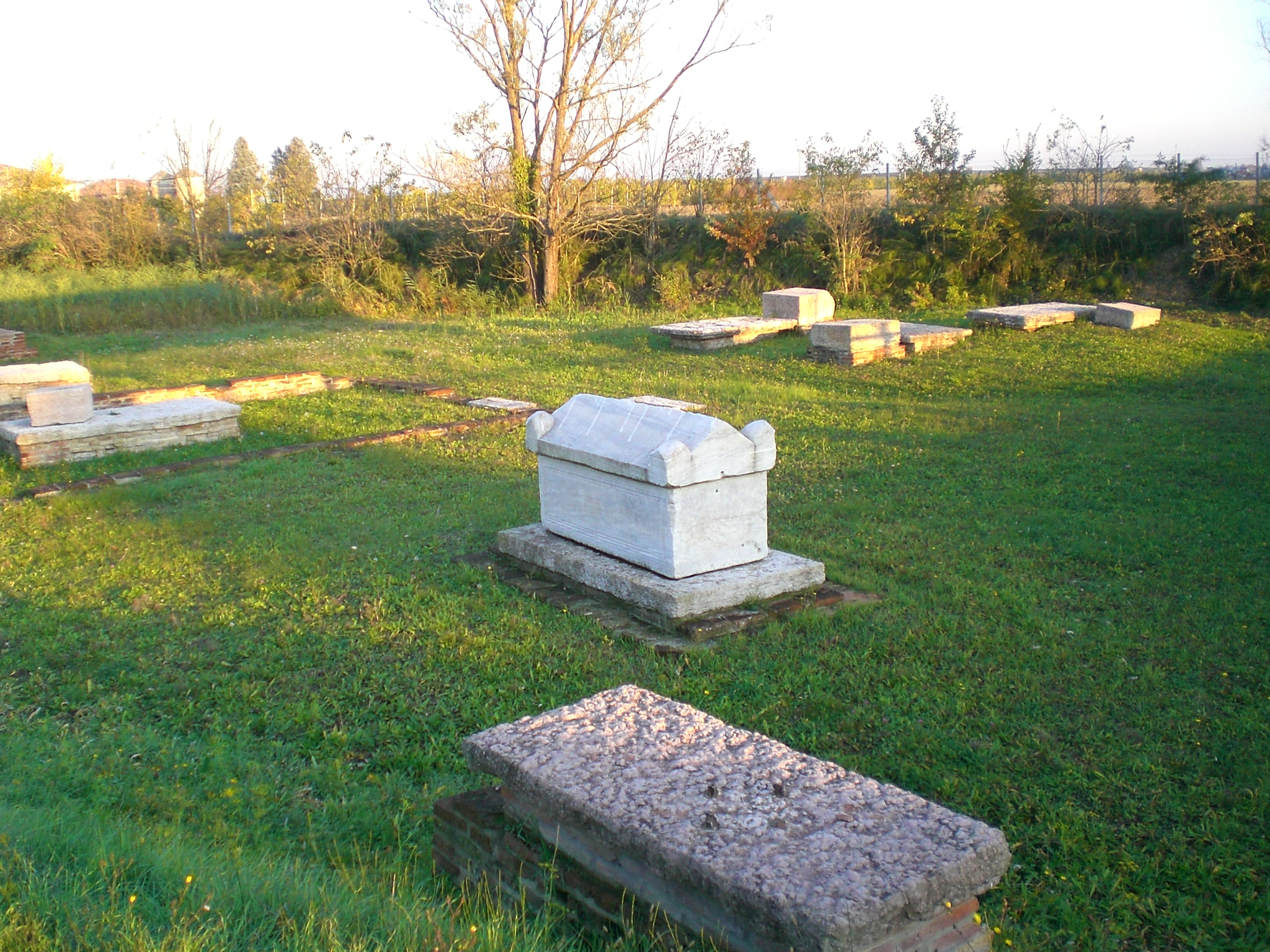 Necropoli romana di Voghenza